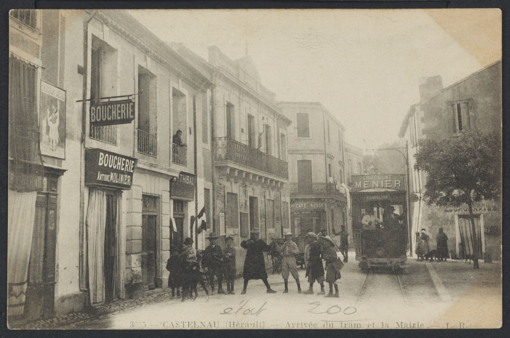 Castelnau. - Arrivée du tram et la Mairie : carte postale